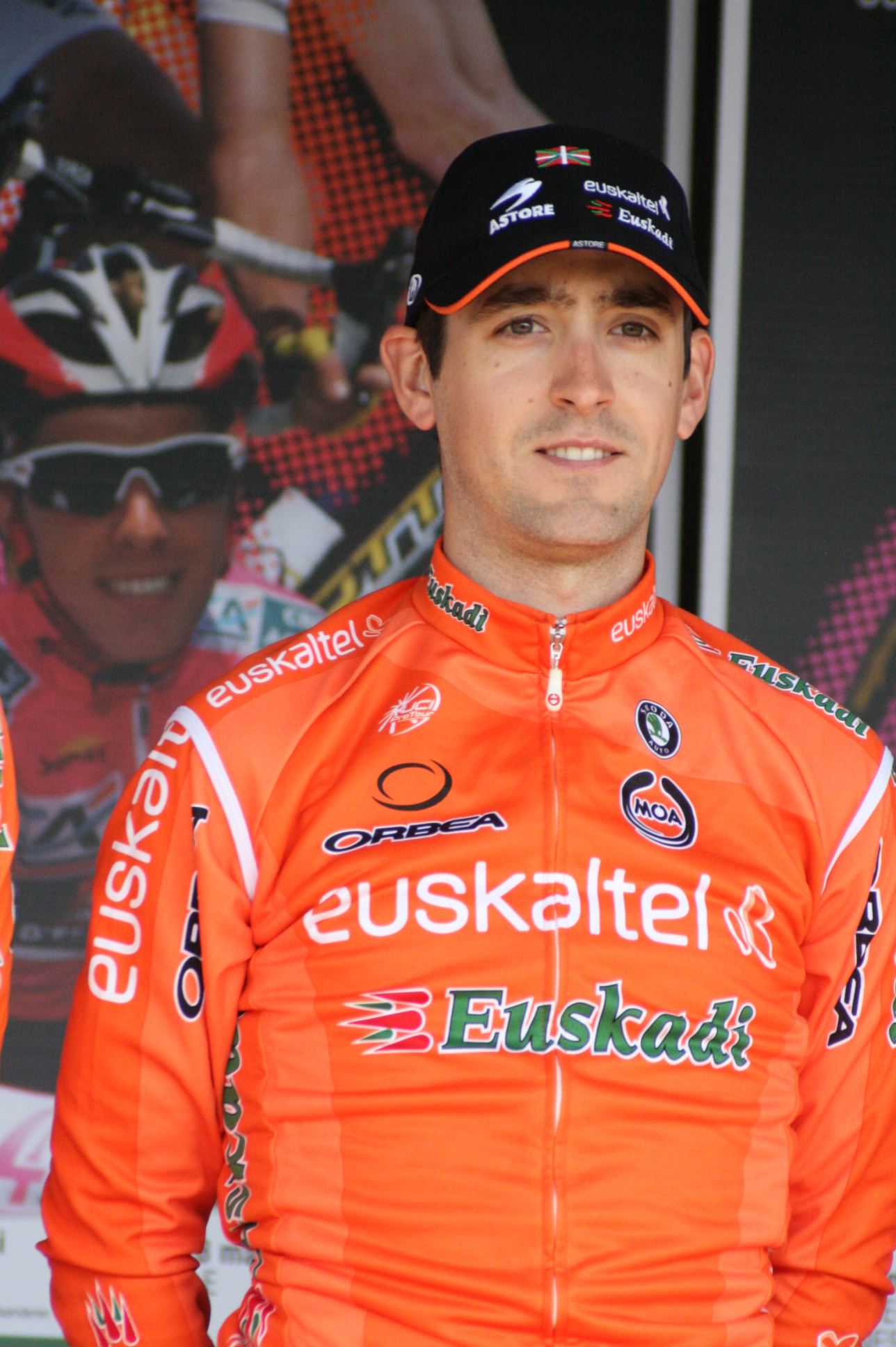 Mikel Nieve lors de la présentation des équipes des 4 jours de Dunkerque